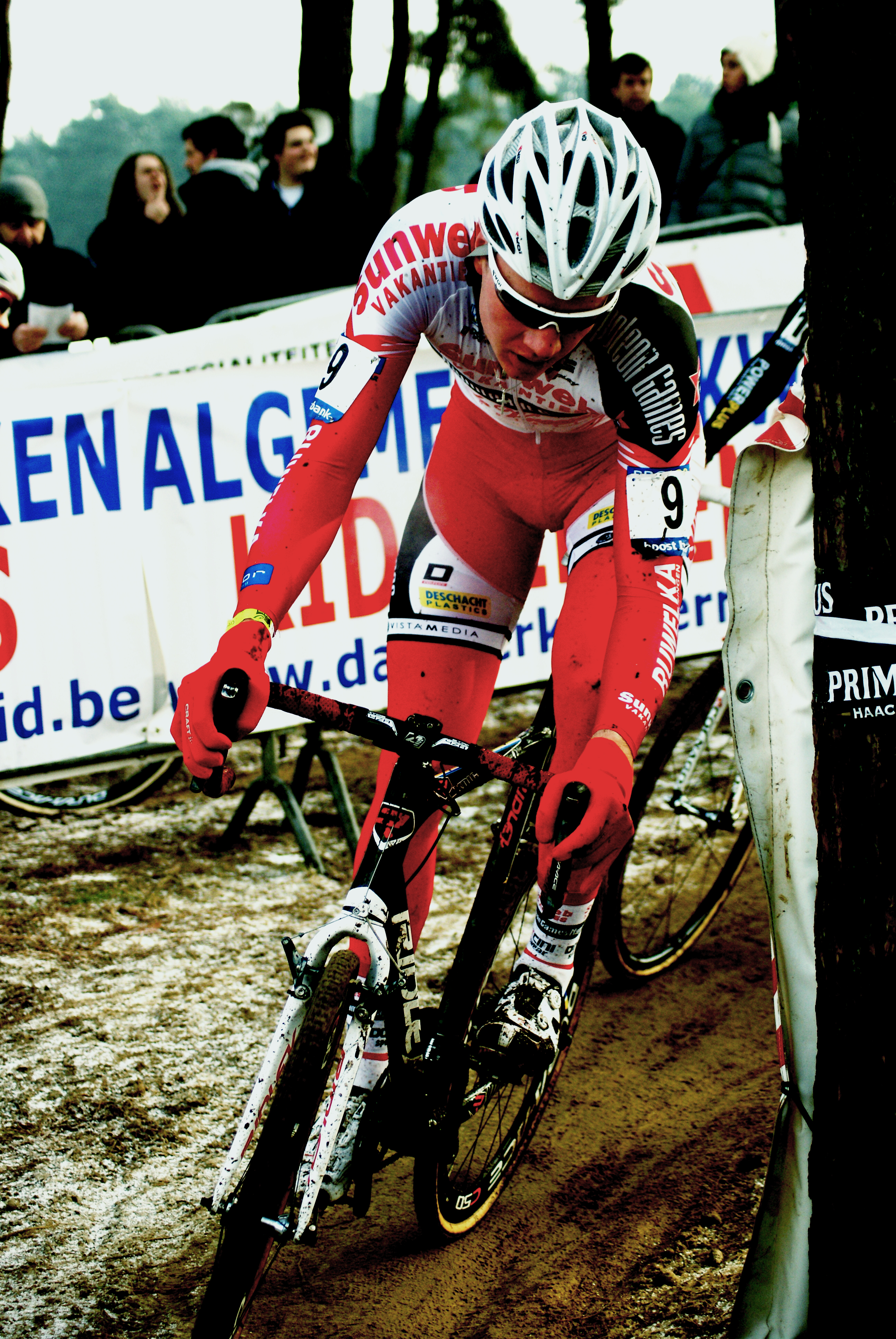 Tijmen Eising tijdens de Krawatencross 2013 in Lille.